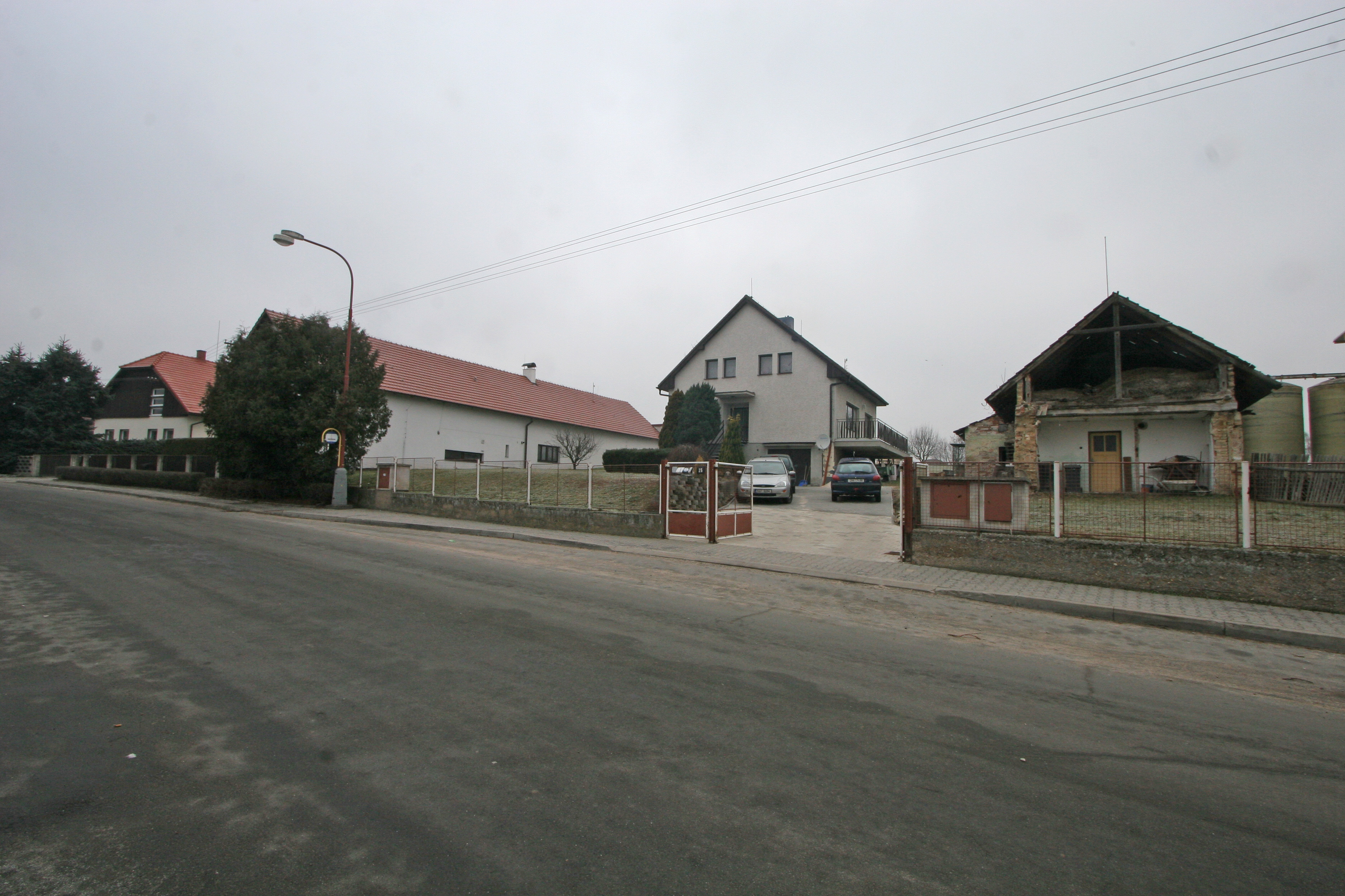 Vyšehněvice čp. 76